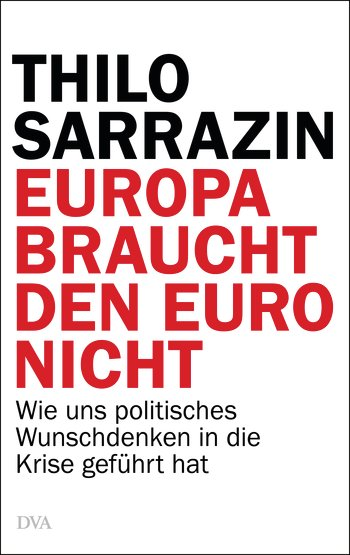 Cover des am 22. Mai 2012 erscheinen Buches „Europa braucht den Euro nicht“ von Thilo Sarrazin.